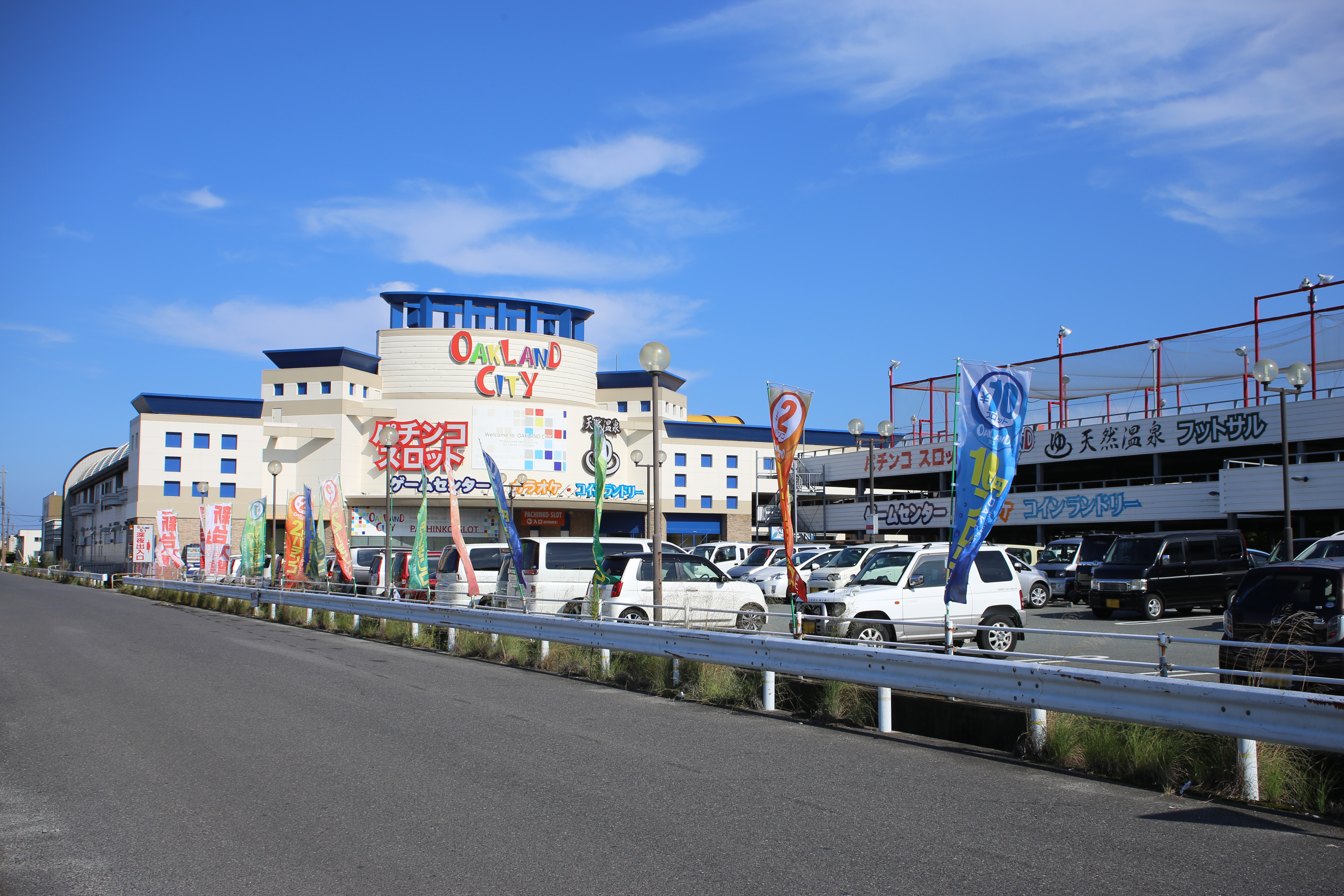 三重県津市の複合娯楽施設オークランドシティ